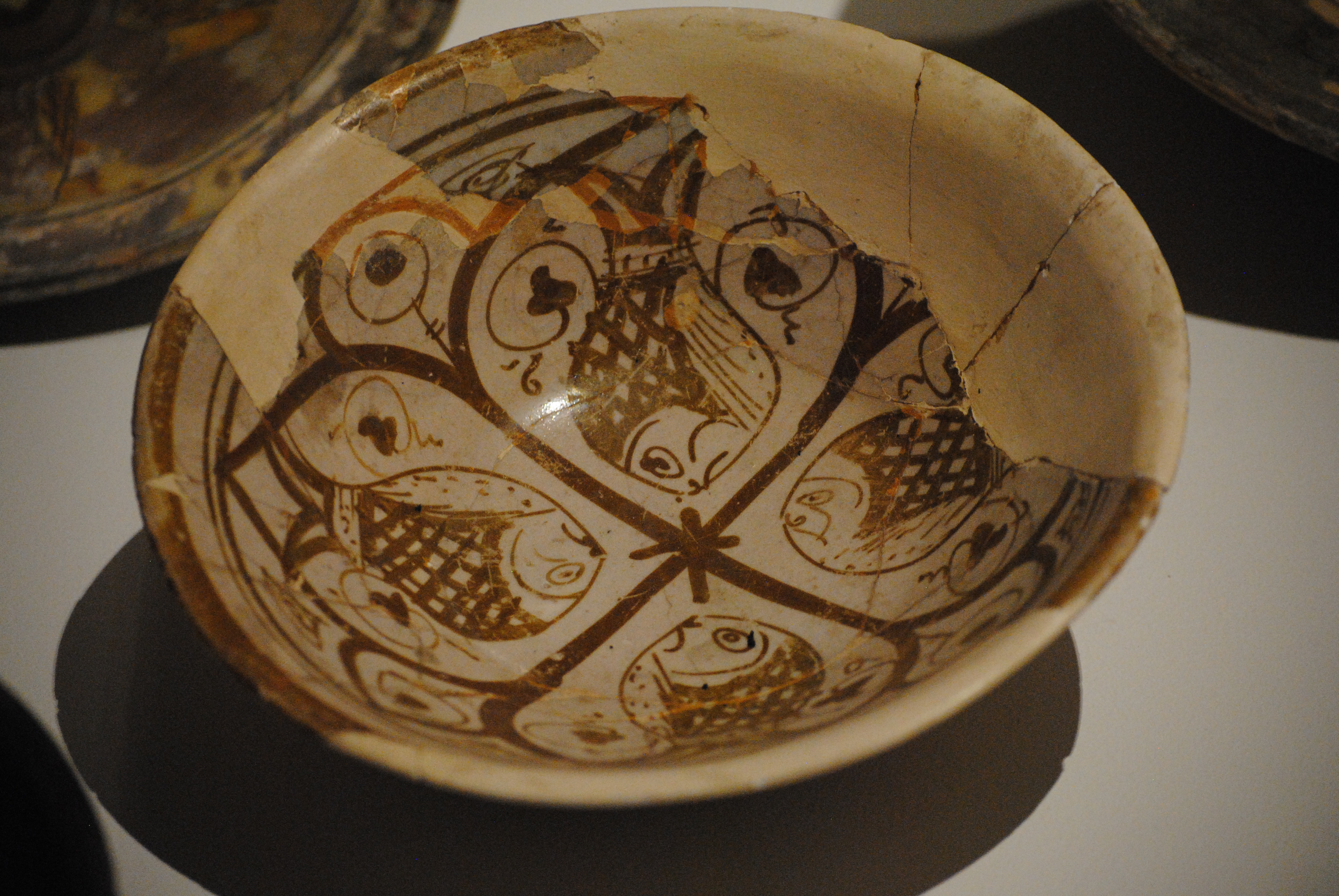 Scodella decorata a lustro metallico usata come bacino ceramico e importata dall'Egitto nella metà del'XI secolo (chiesa di Santo Stefano extra moenia, Pisa) - Museo nazionale di San Matteo.